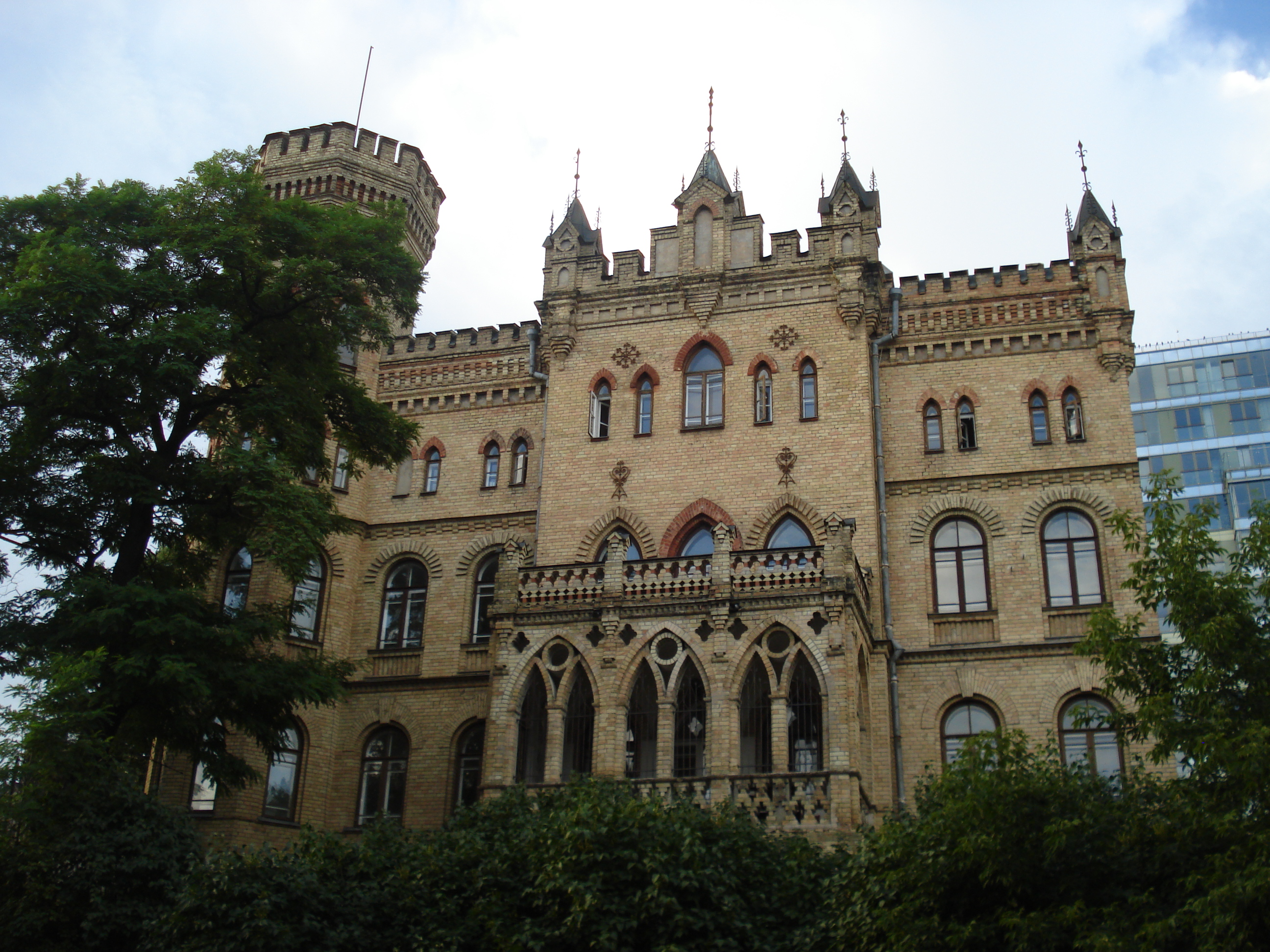 House of medician Hilary Raduszkiewicz built by Julian Januszewski (1894) in Vilnius (Kalvarijų g. 1; Architektų sąjungos būstinė)